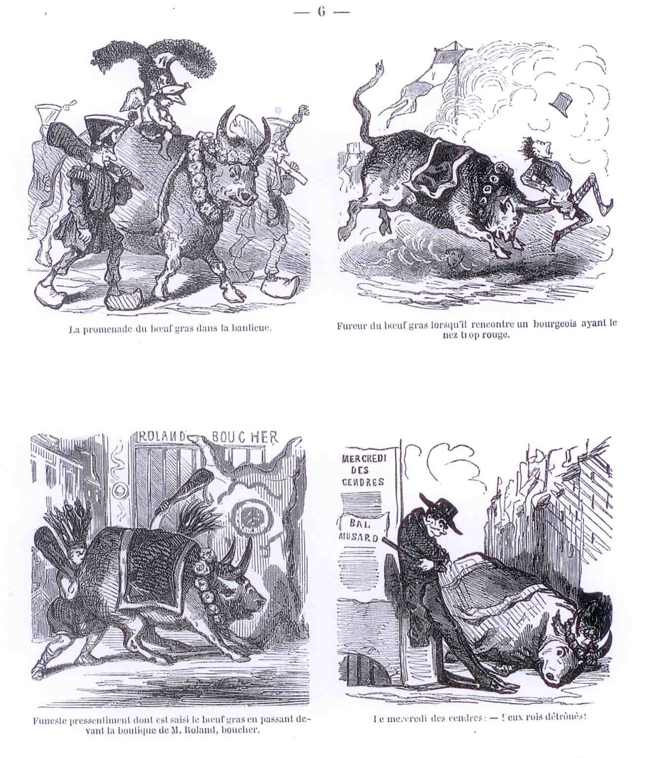 Quatre caricatures de Cham à propos du Carnaval de Paris